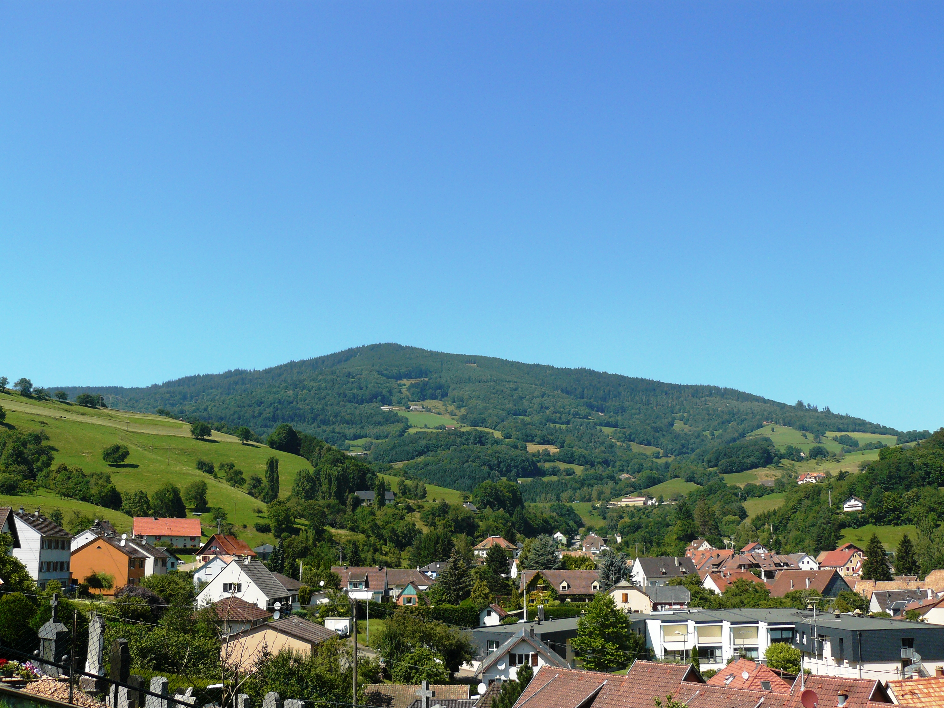 Vue partielle de Lapoutroie: vers l'est du village